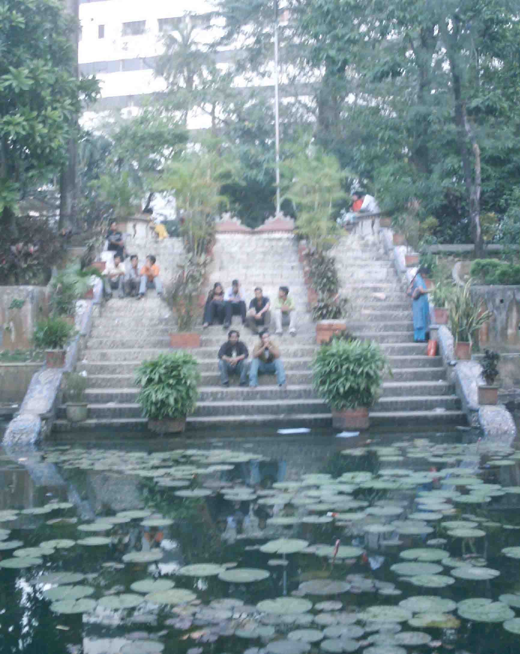 Baldha Garden's pond, Dhaka, Bangladesh.